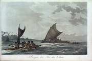 Pirogue